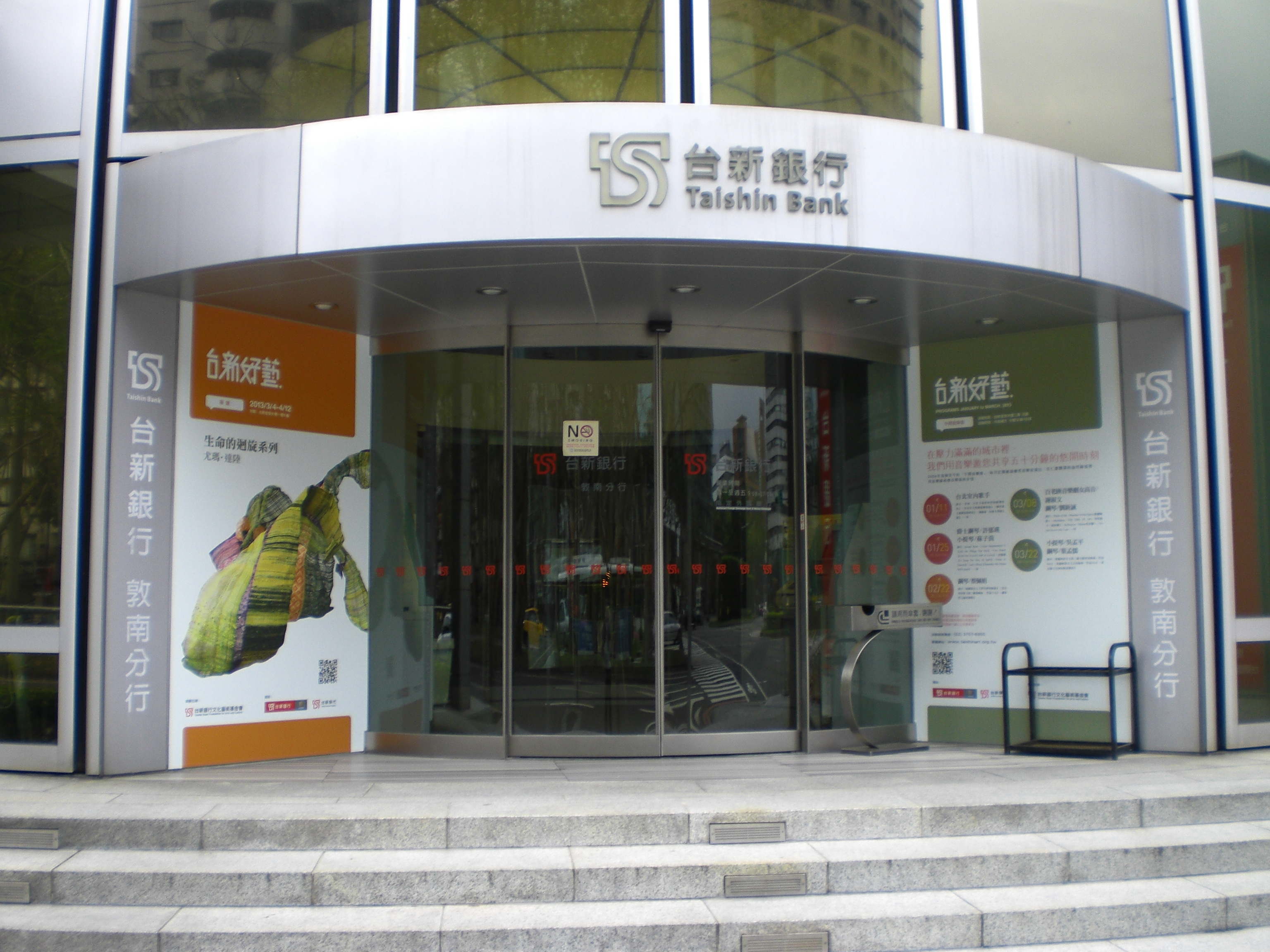 台新國際商業銀行敦南分行，位於臺北市大安區仁愛路四段118號。